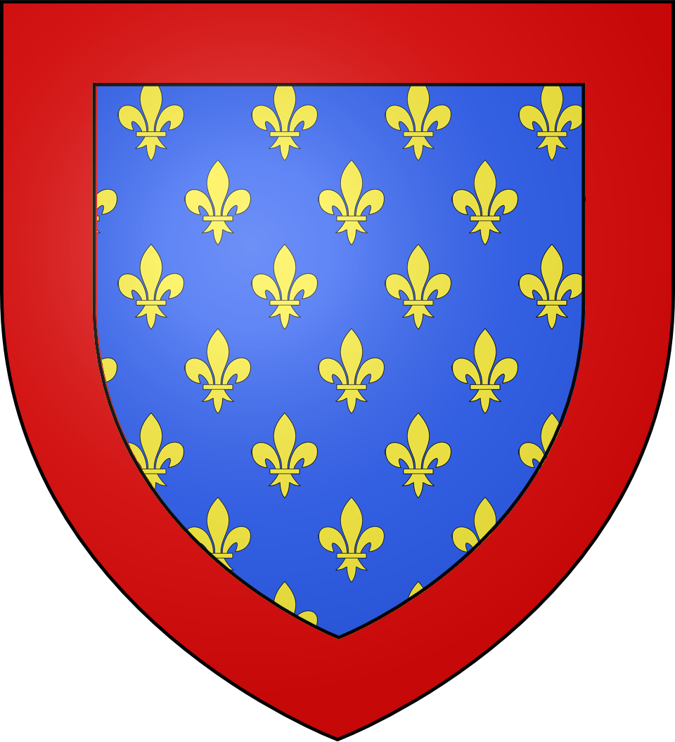 Blason du duché d'Anjou : D'azur au trois fleurs de lys d'or à la bordure de gueules